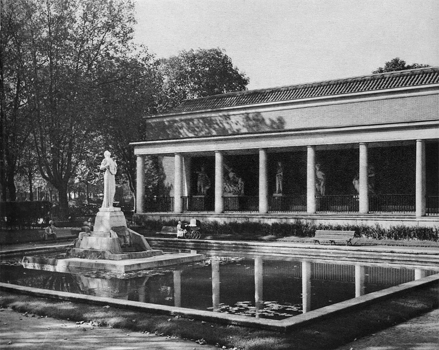 Vista del atrio del primer edificio del Museo de Bellas Artes de Bilbao.